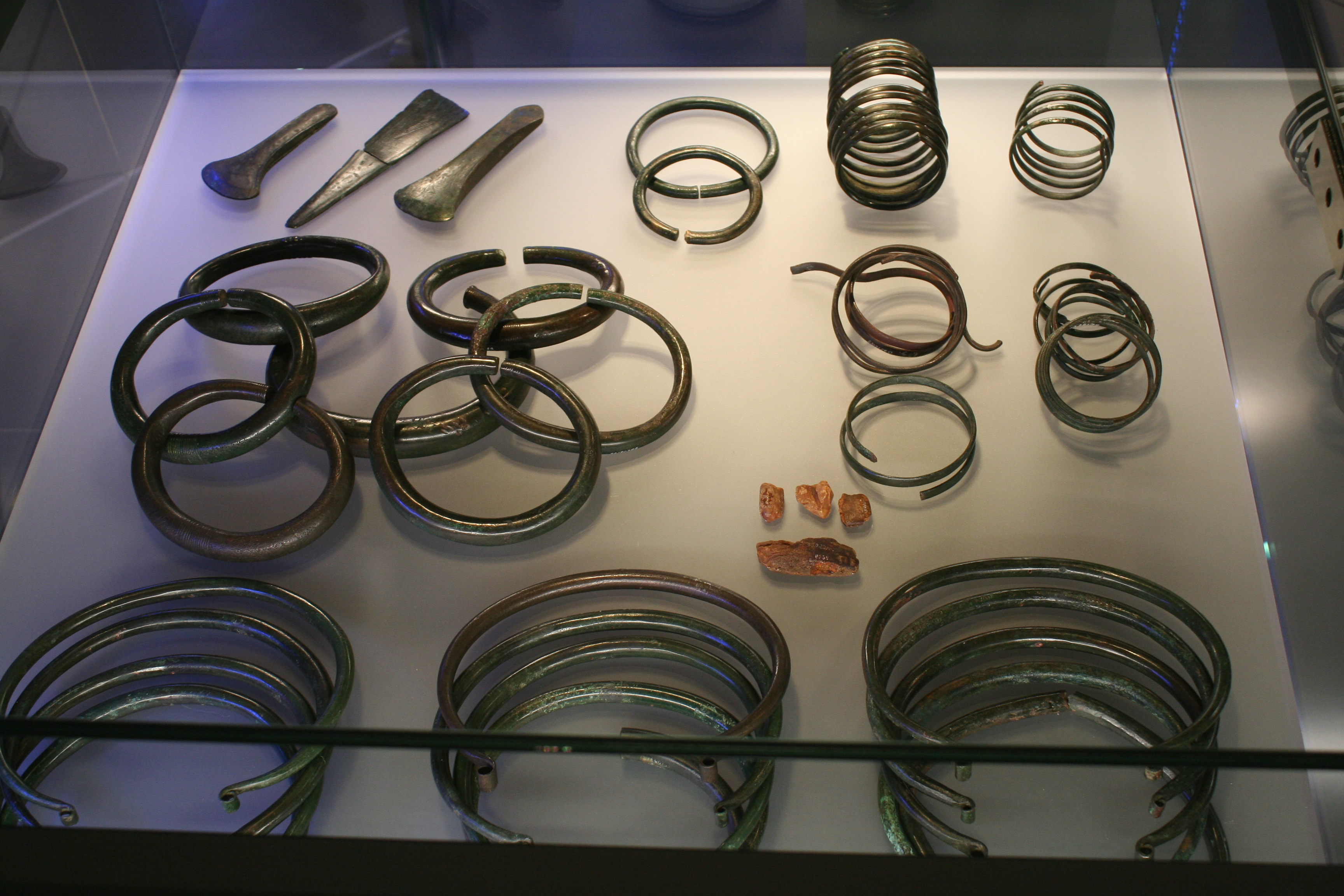 Depotfund mit Ringschmuck und Barren der Aunjetitzer Kultur aus Wauden, 2200-1700 v. Chr.; Staatliches Museum für Archäologie Chemnitz